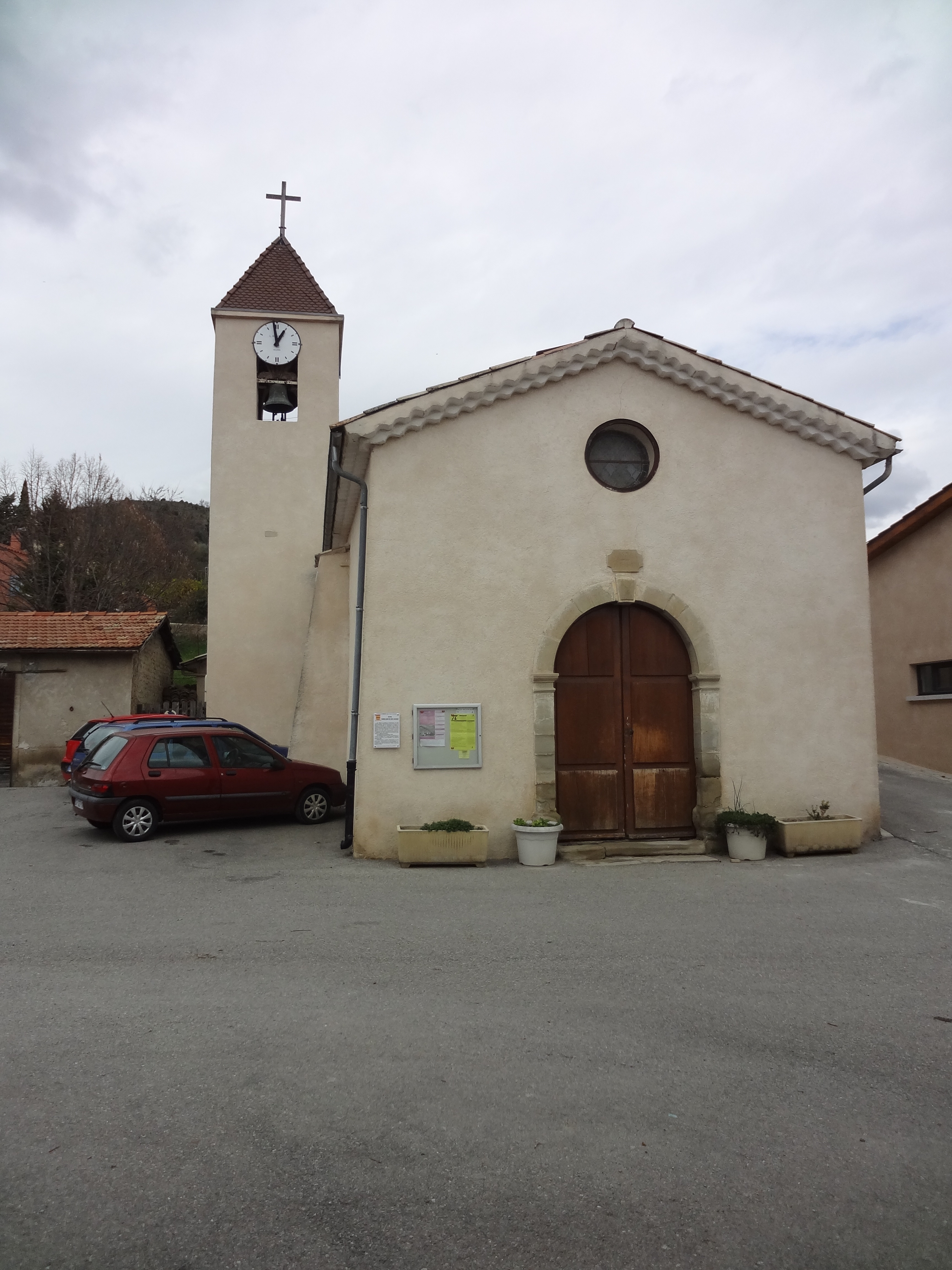 construite en 1639 comme chapelle, puis promue paroissiale en 1890 après réparations, restaurée en 1968, 1992 et 1999